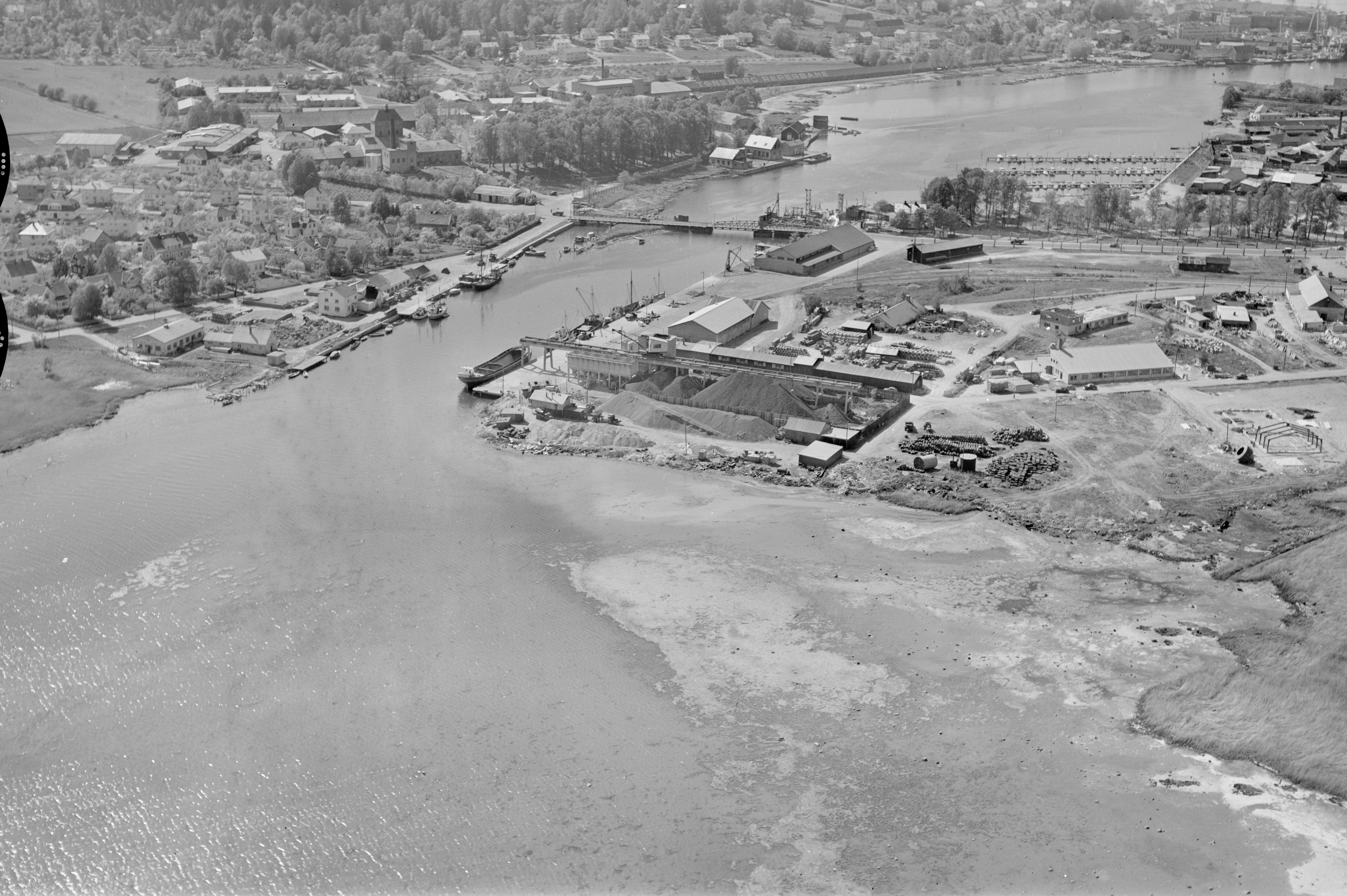 WF.S.A1243